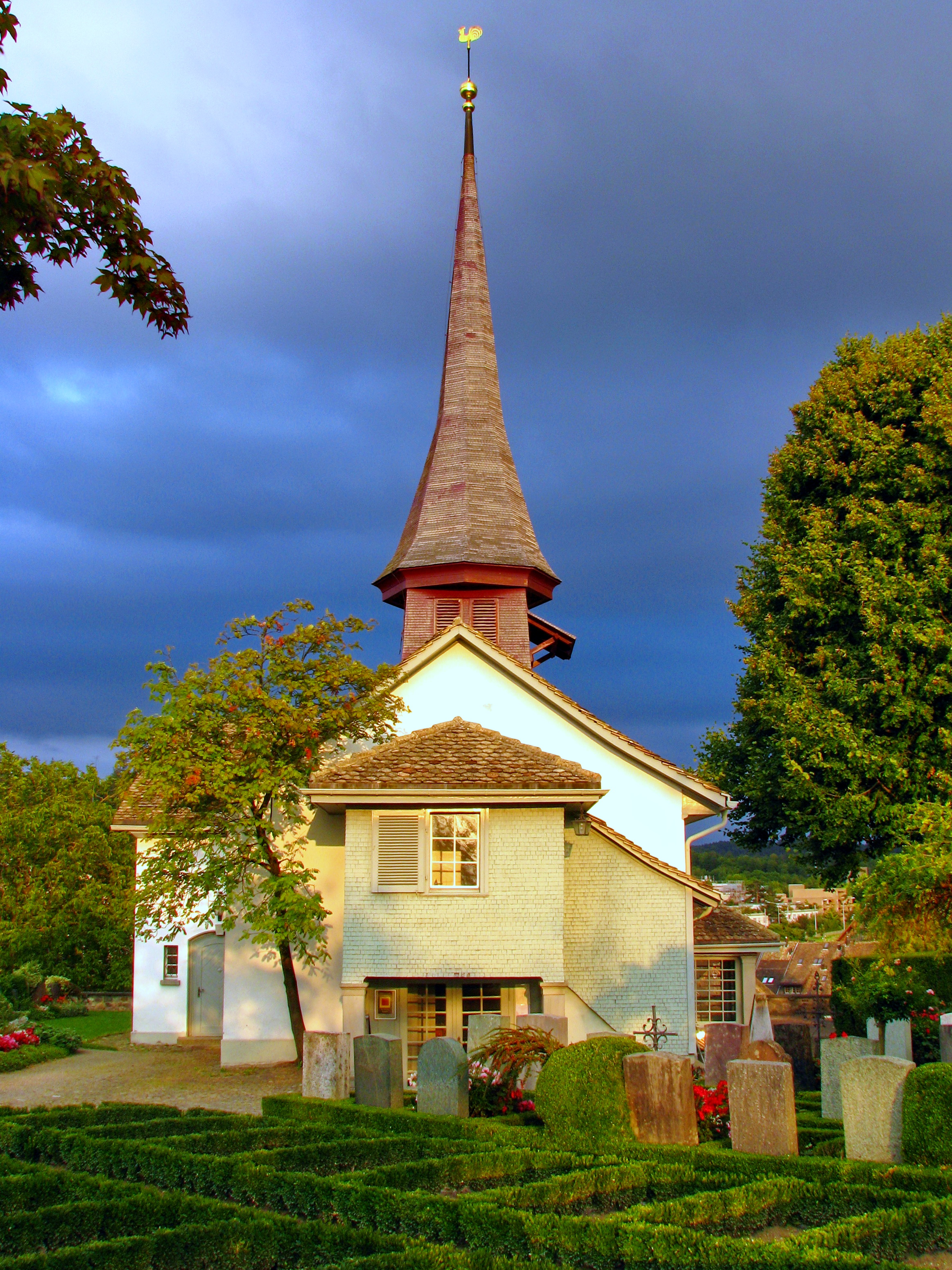 Alte Kirche (Old church) in Zürich-Witikon (Switzerland)